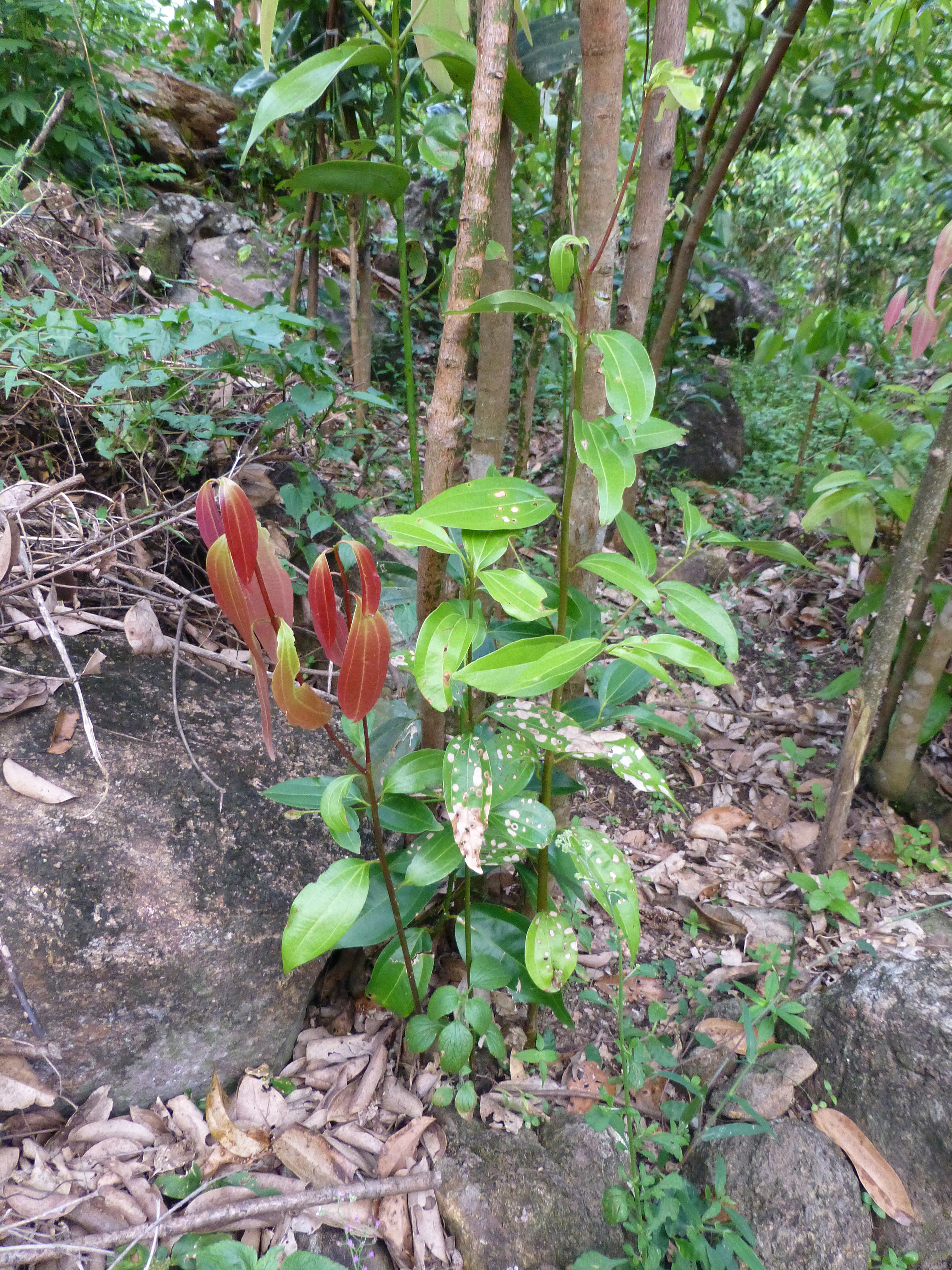 Canneliers de Ceylan (Cinnamomum verum) au Sri Lanka (Province du Sud)